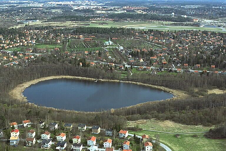 Kyrksjön och Bromma kyrka. Motiv: Norra Ängby Nyckelord: Flygbilder, Riksintressen Kategori: Egnahemsområde Kyrksjön och Bromma kyrka.